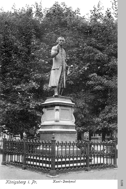 Kantdenkmal auf dem Paradeplatz vor der Albertina in Königsberg